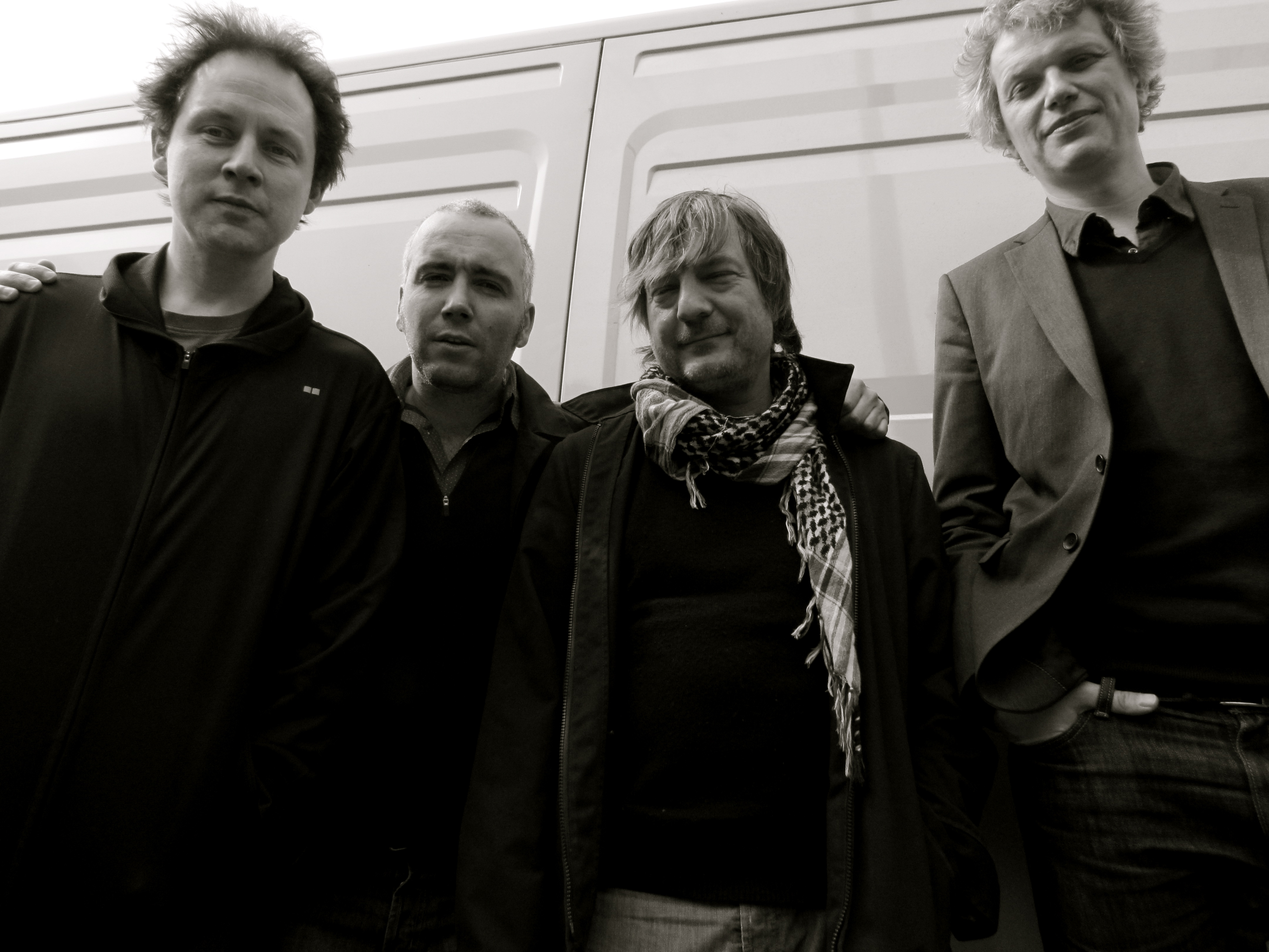 photo du groupe